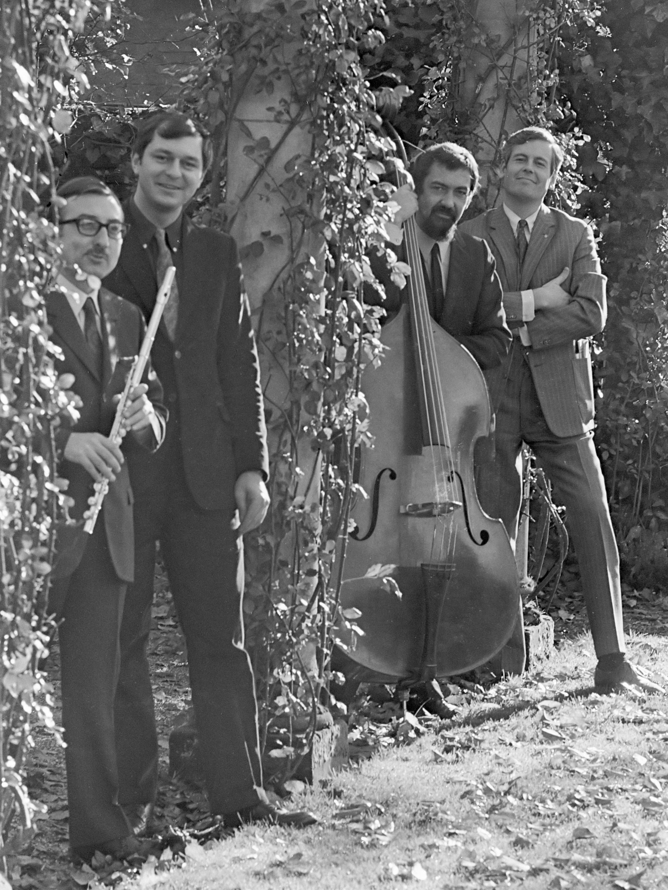 Kwartet Raymond Guiot in Voor de vuist weg. Raymond Guiot, Daniel Humair, Guy Pedersen en George Gruntz 17 november 1967